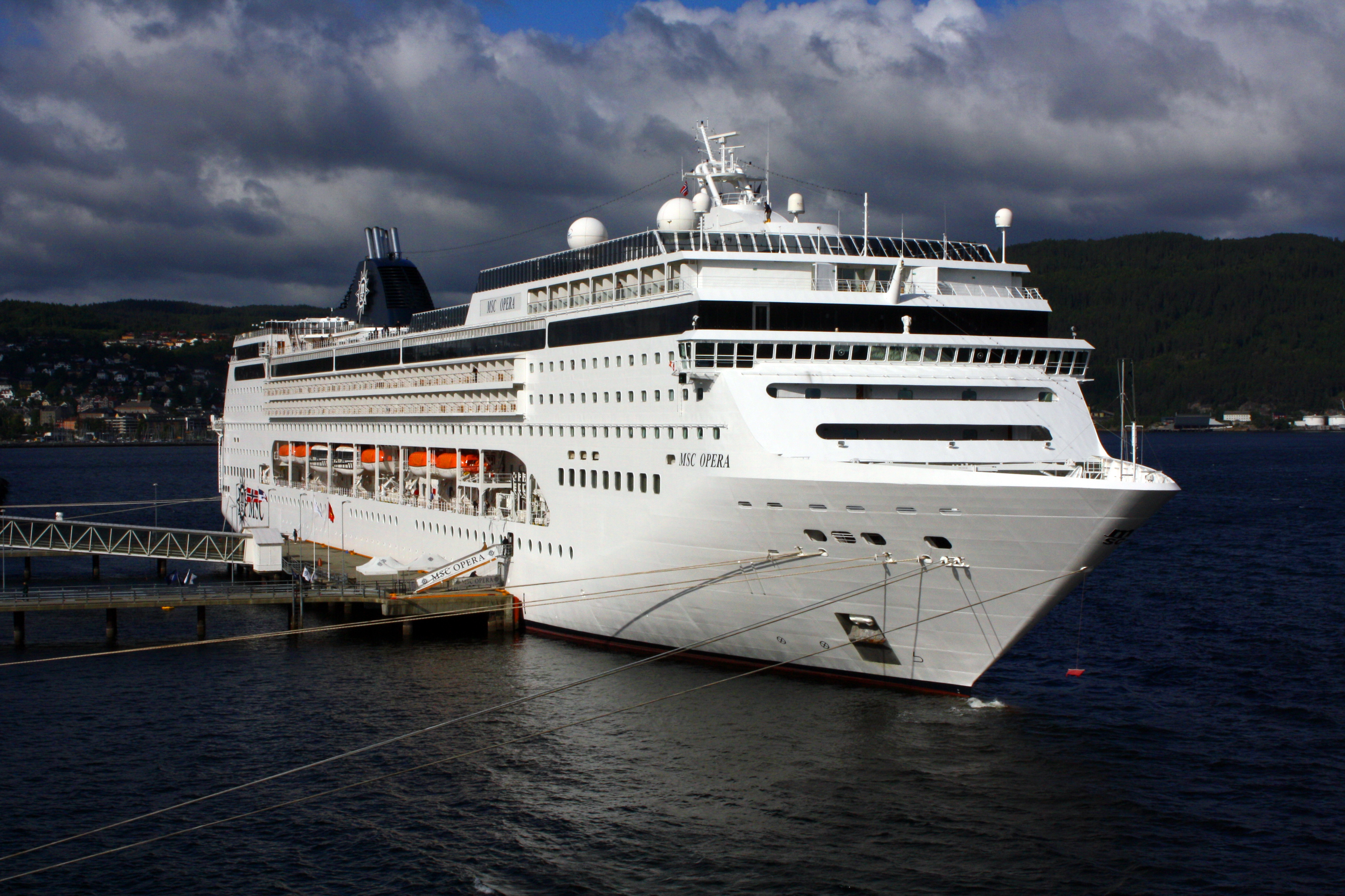 MSC Opera ved Turistskipskaia i Trondheim.